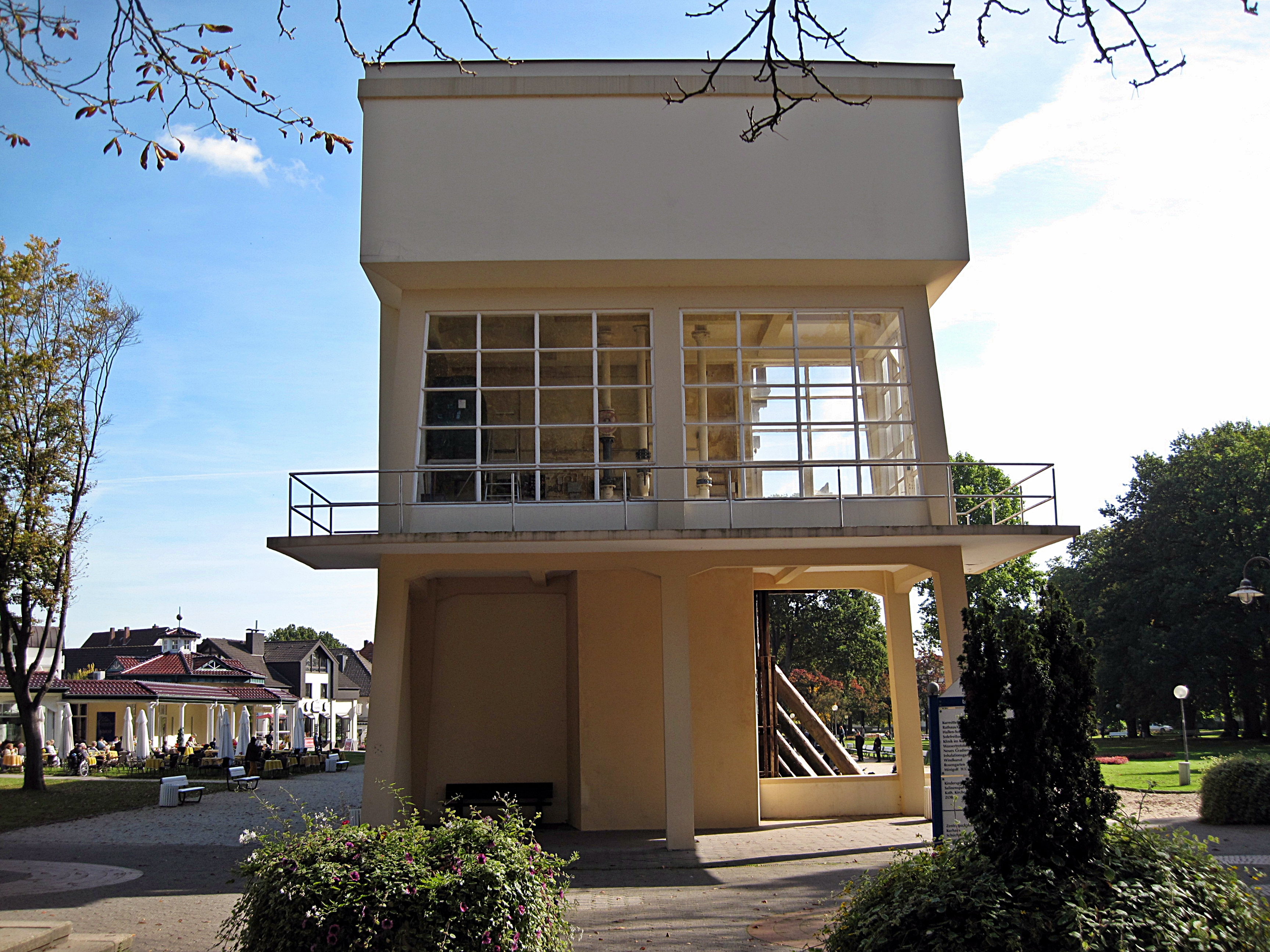 Bad Rothenfelde, Pumpenhaus vorm Gradierwerk am Kurpark